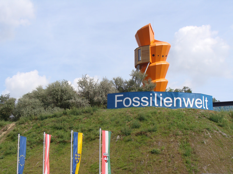 Aussichtsturm in Form einer Turmmuschel in der Fossilienwelt Weinviertel